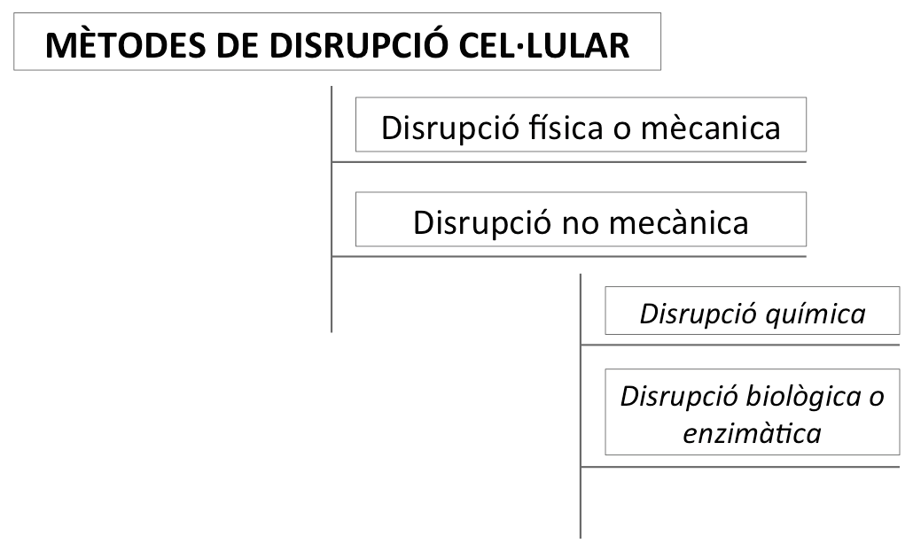 Esquema general sobre els mètodes de disrupció cel·lular.